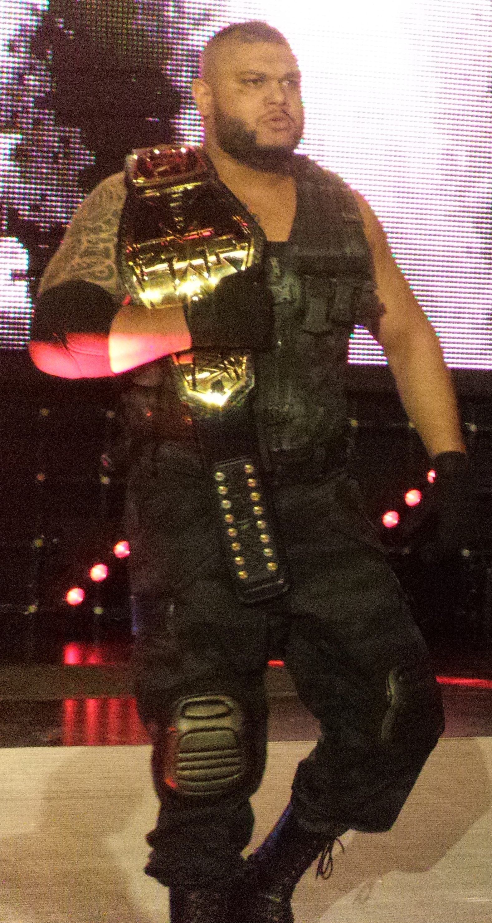 P_20170201_191226_002